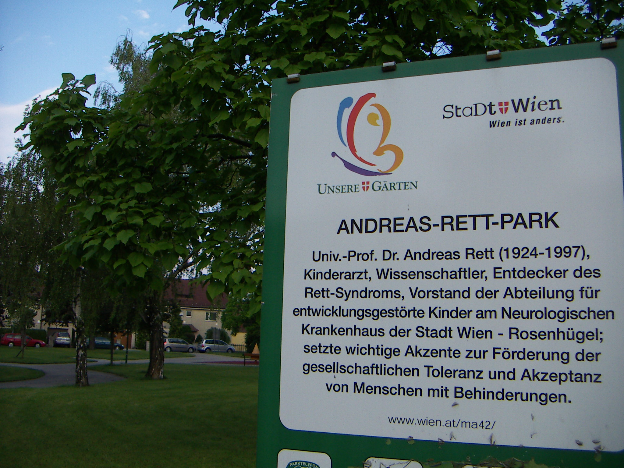 Andreas-Rett-Park, Wien - Hietzing